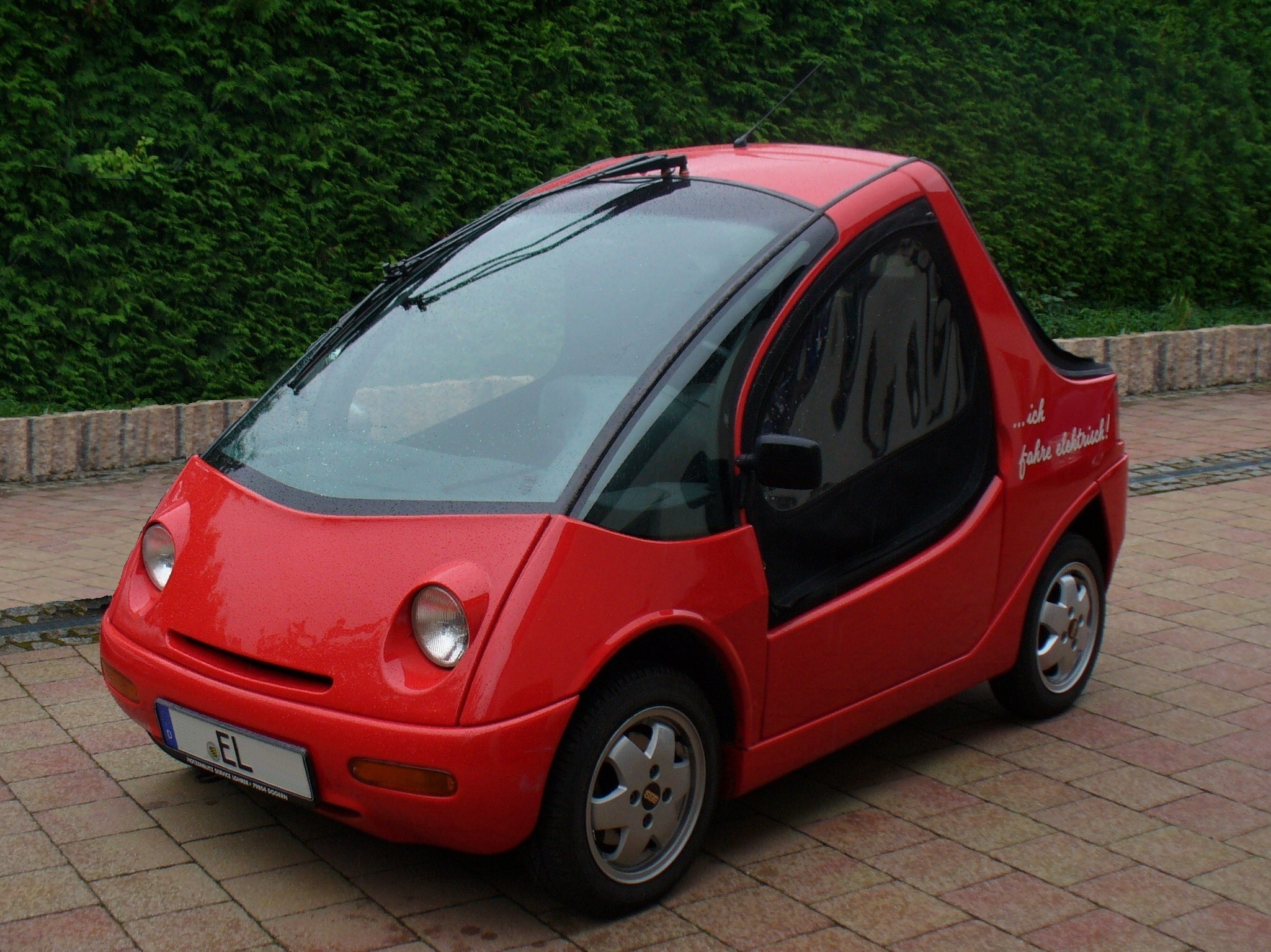 Hotzenblitz Elektroauto Buggy (EL Sport) mit ABS-Karosserie, erkennbar an der Naht in Fortführung der Frontscheibe zum Aufklappen der Motorhaube. Stofftüren und Stoffverdeck (geschlossen)